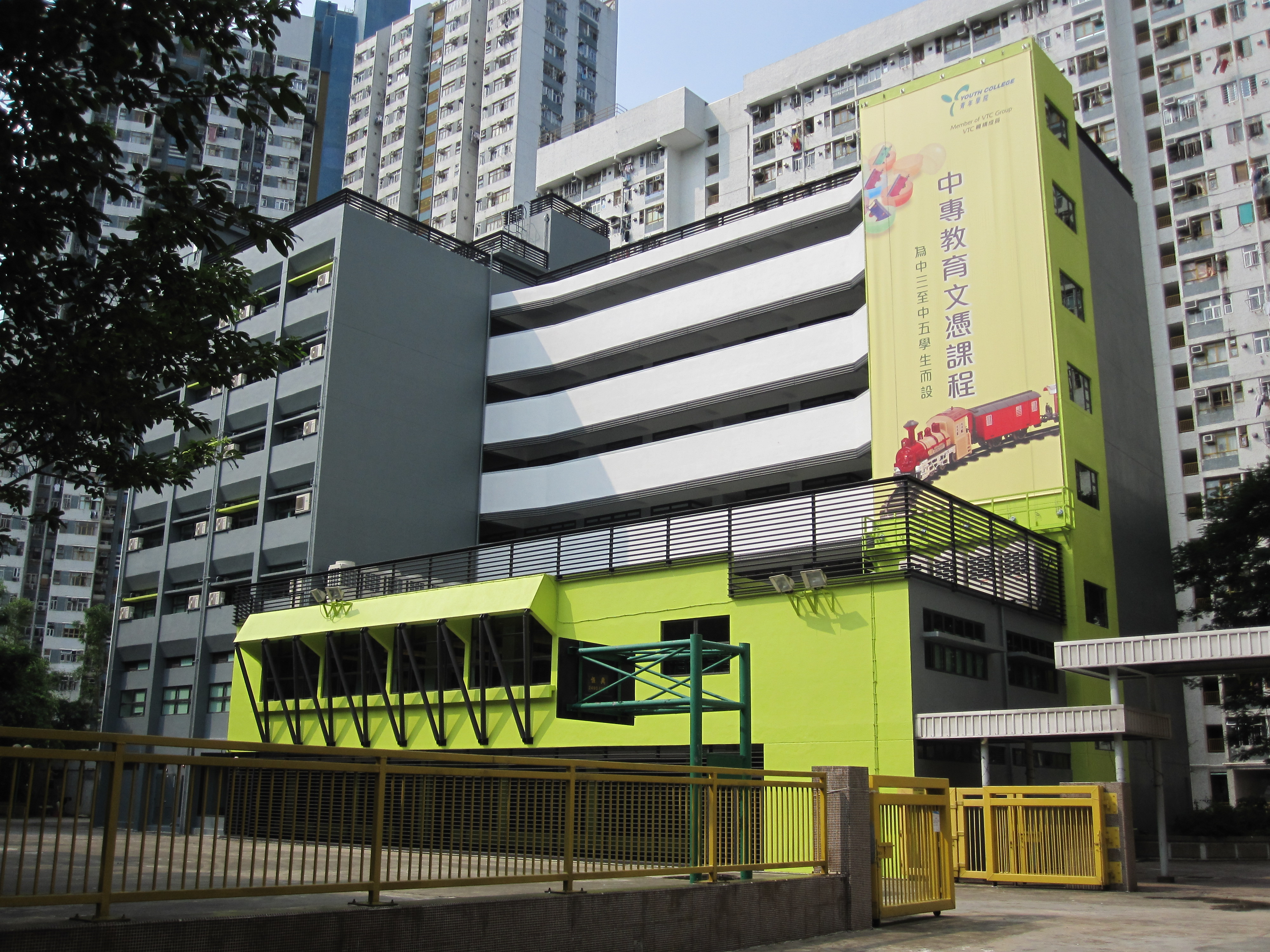 中文（香港）: 位於將軍澳翠林邨內的青年學院青年學院將軍澳分校